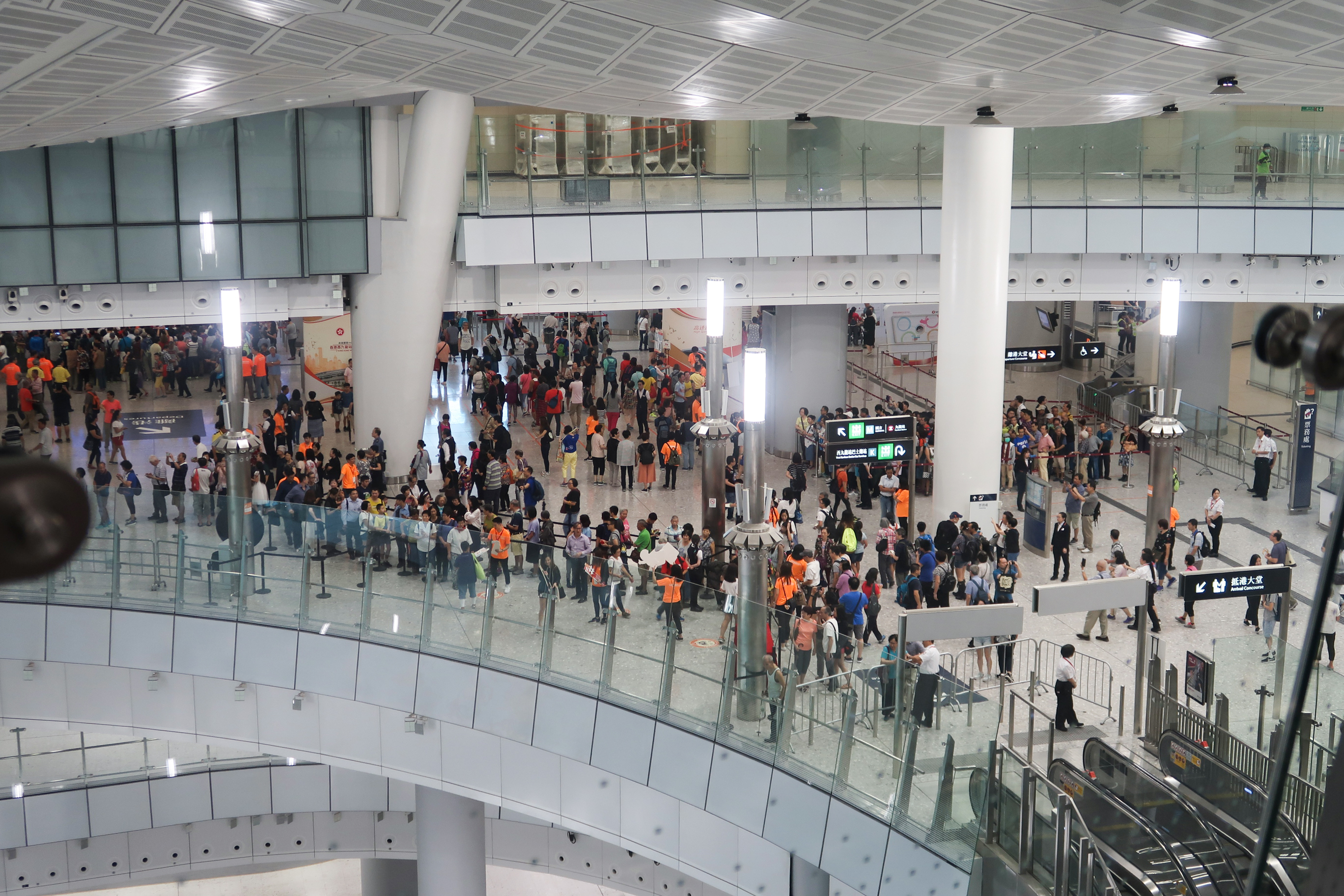 Hong Kong West Kowloon Station